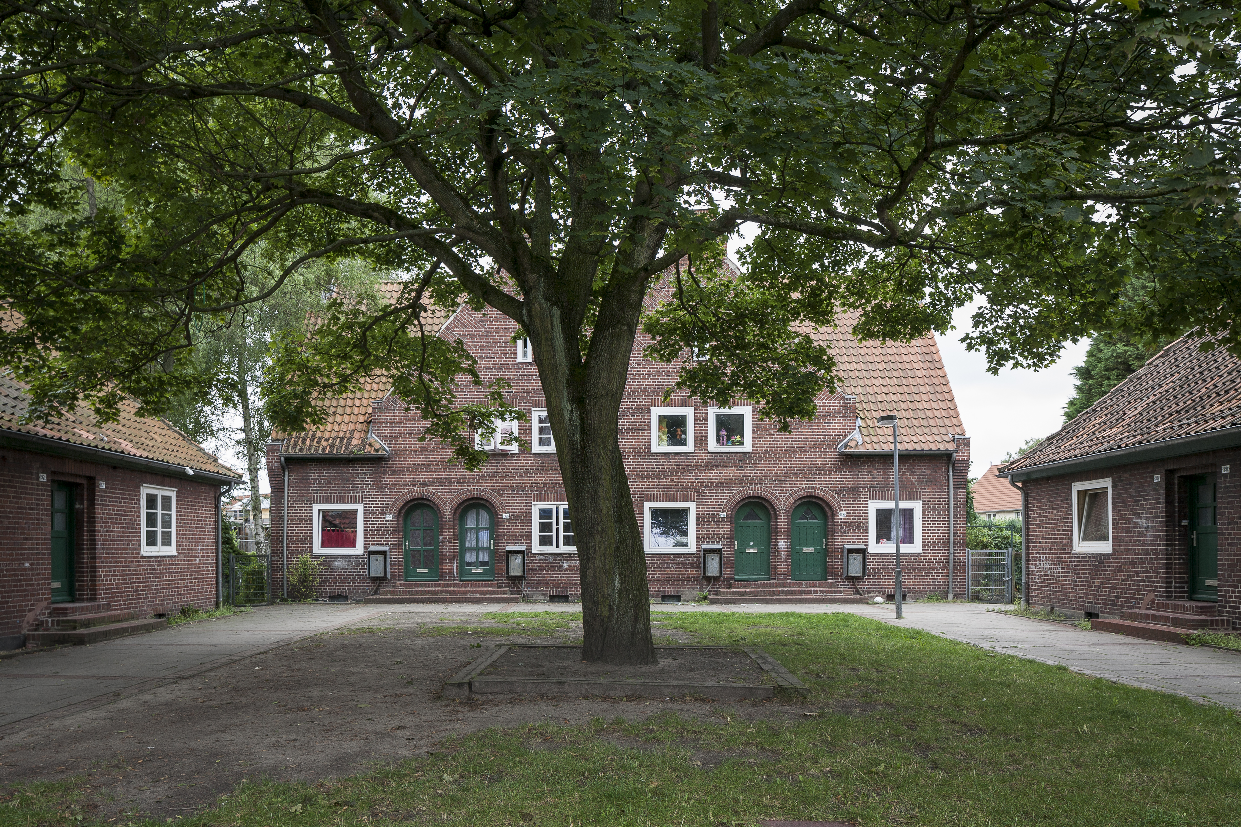 Städtische Kleinhaussiedlung an der Schulenburger Landstraße in Hannover-Hainholz. Die Gebäude wurden von 1921-23 vom Architekten Paul Wolf entworfen und realisiert.